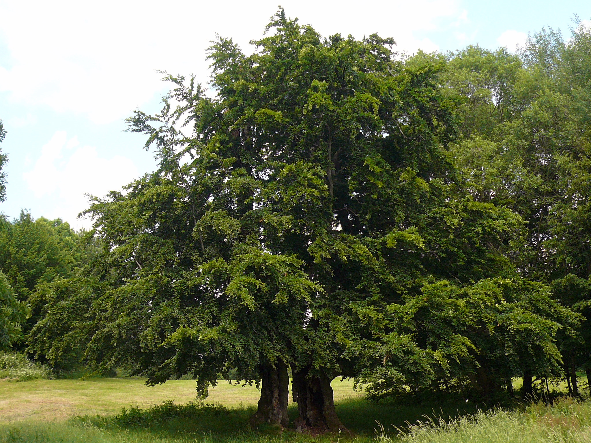 beech at Mitgenfeld, Franken